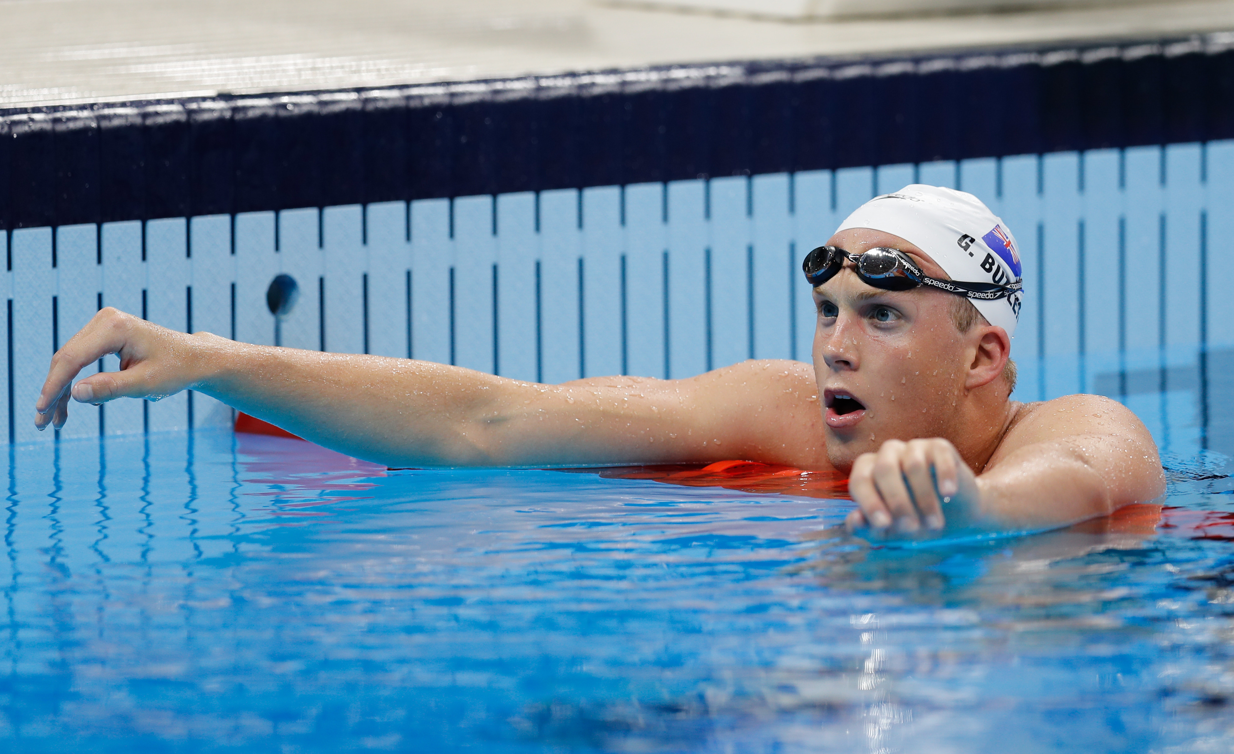 Rio de Janeiro - Atletas da equipe de natação das Ilhas Cayman treinam na piscina do Estádio Aquático, no Parque Olímpico da Barra da Tijuca (Fernando Frazão/Agência Brasil)